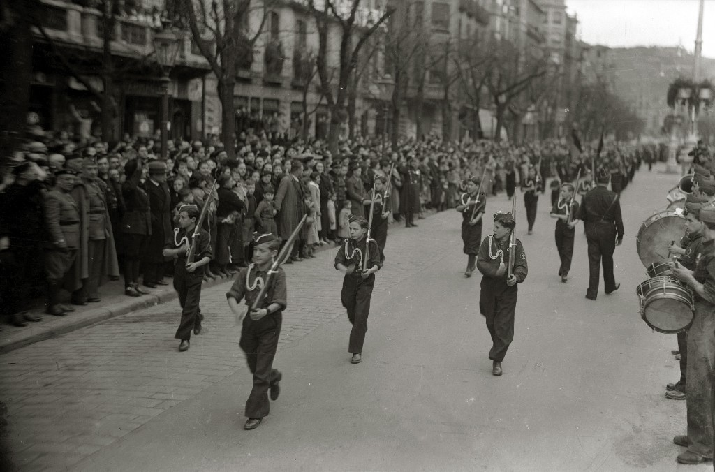 Título original: Preparativos y desfiles militares por la avenida de la Libertad (8/12) Localización: San Sebastián (Guipúzcoa)